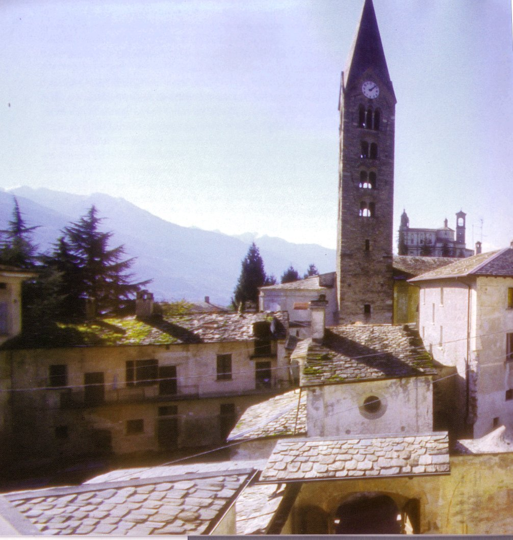 Tresivio Italie